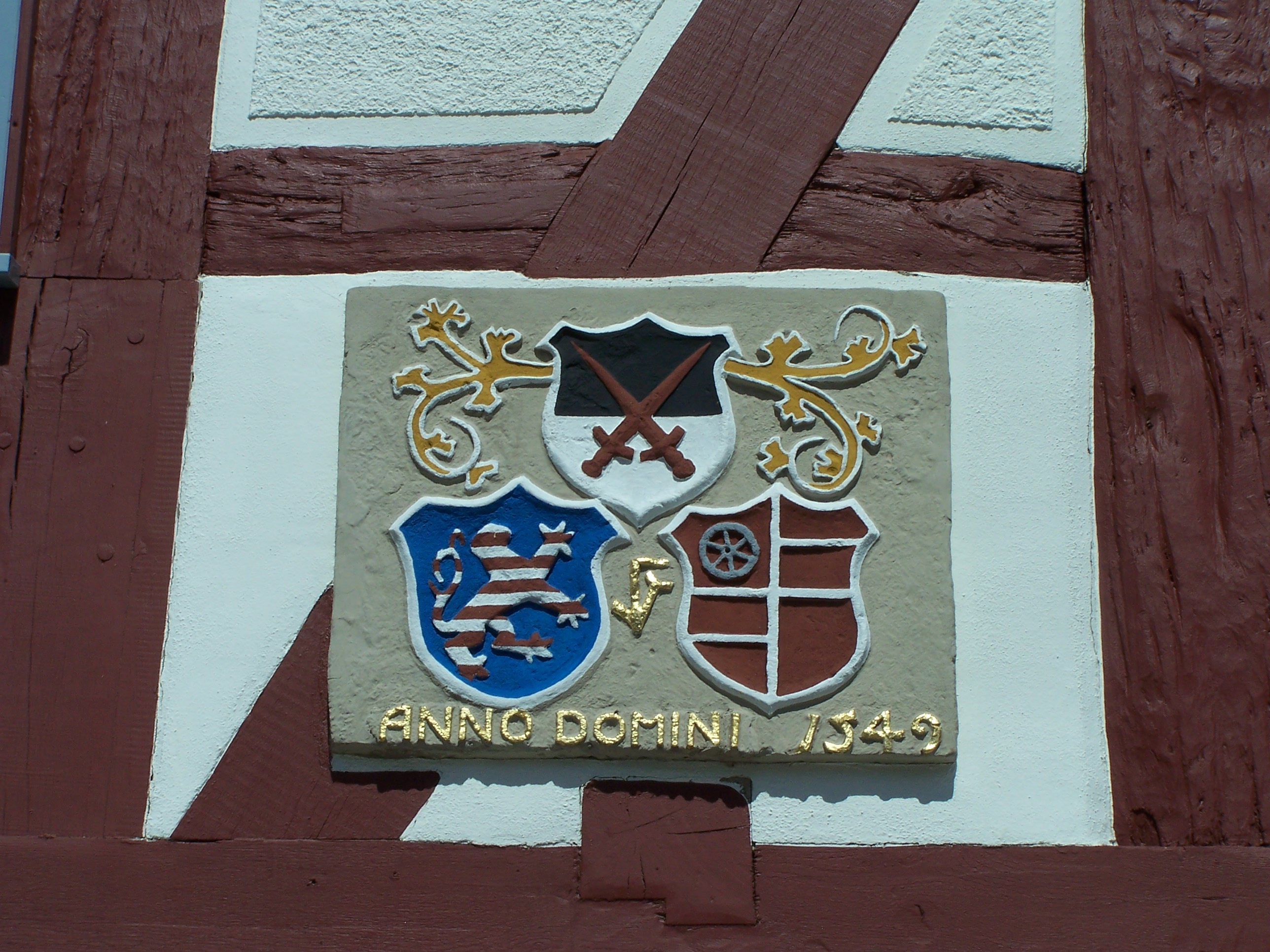 Steinerne Wappentafel der Ganerbschaft Treffurt am Treffurter Rathaus.